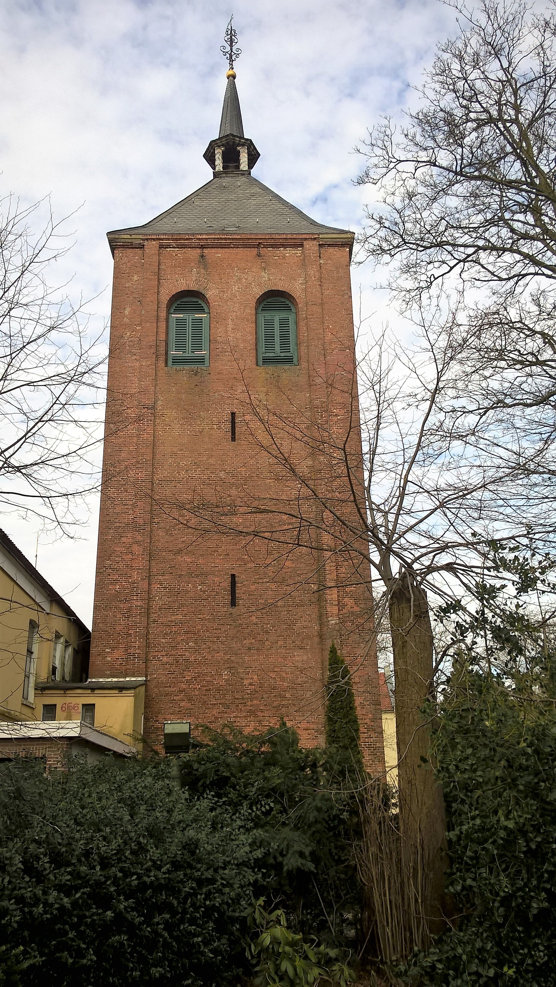 Kirchturm der Georgskirche in Weener, Ostfriesland, Niedersachsen, Deutschland